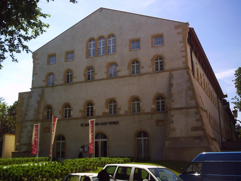 Le magazin aux vivres de Metz.